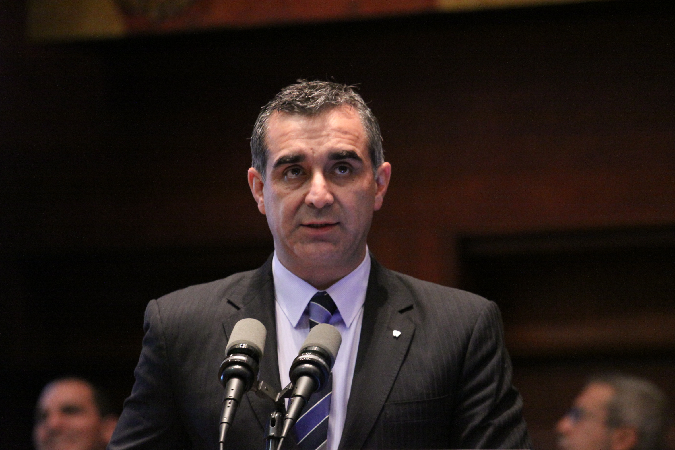 27 enero de 2015.- Presentación de informes anuales de labores de conformidad con el Art. 47 de la Ley Orgánica de la Función Legislativa Tema: Gustavo Jalkh presidente del Consejo de la Judicatura, presenta informe de transparencia en el pleno de la Asamblea Nacional Fotografía: Hugo Ortiz / Asamblea Nacional